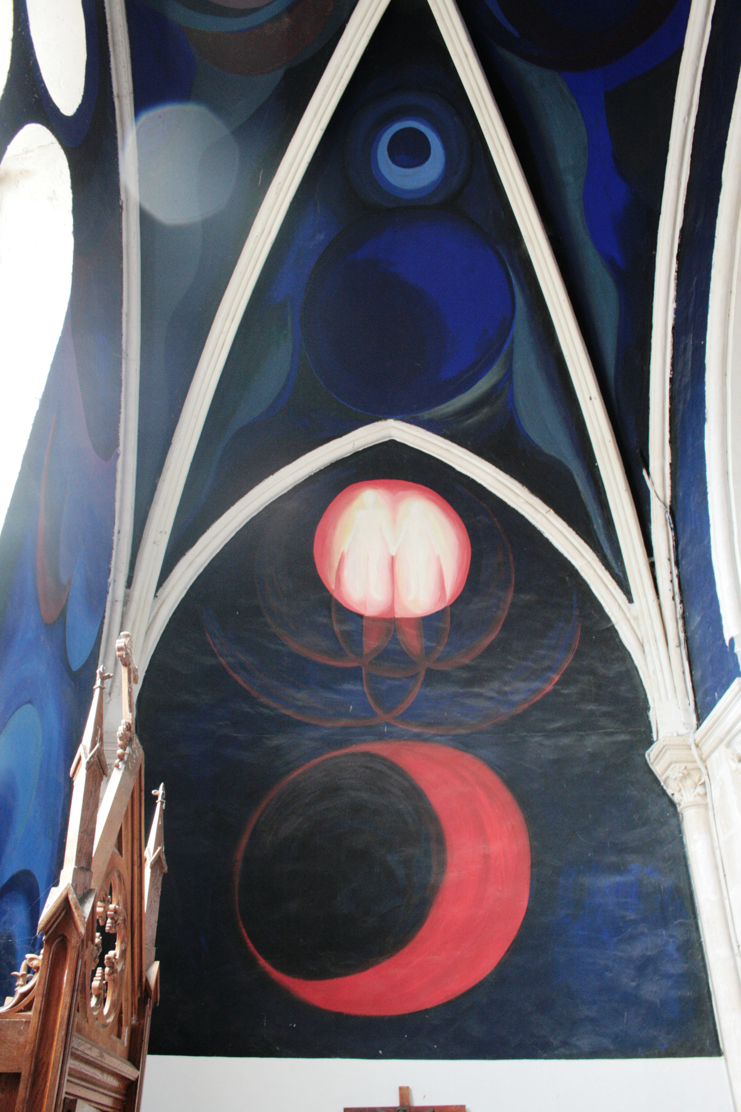 Eglise de Le Menoux, Indre, France. Fresques de Jorge Carrasco, peintre bolivien actif et mort en France (1919-2006). Fresques réalisées de 1968 à 1976. Le Paradis (transept gauche).